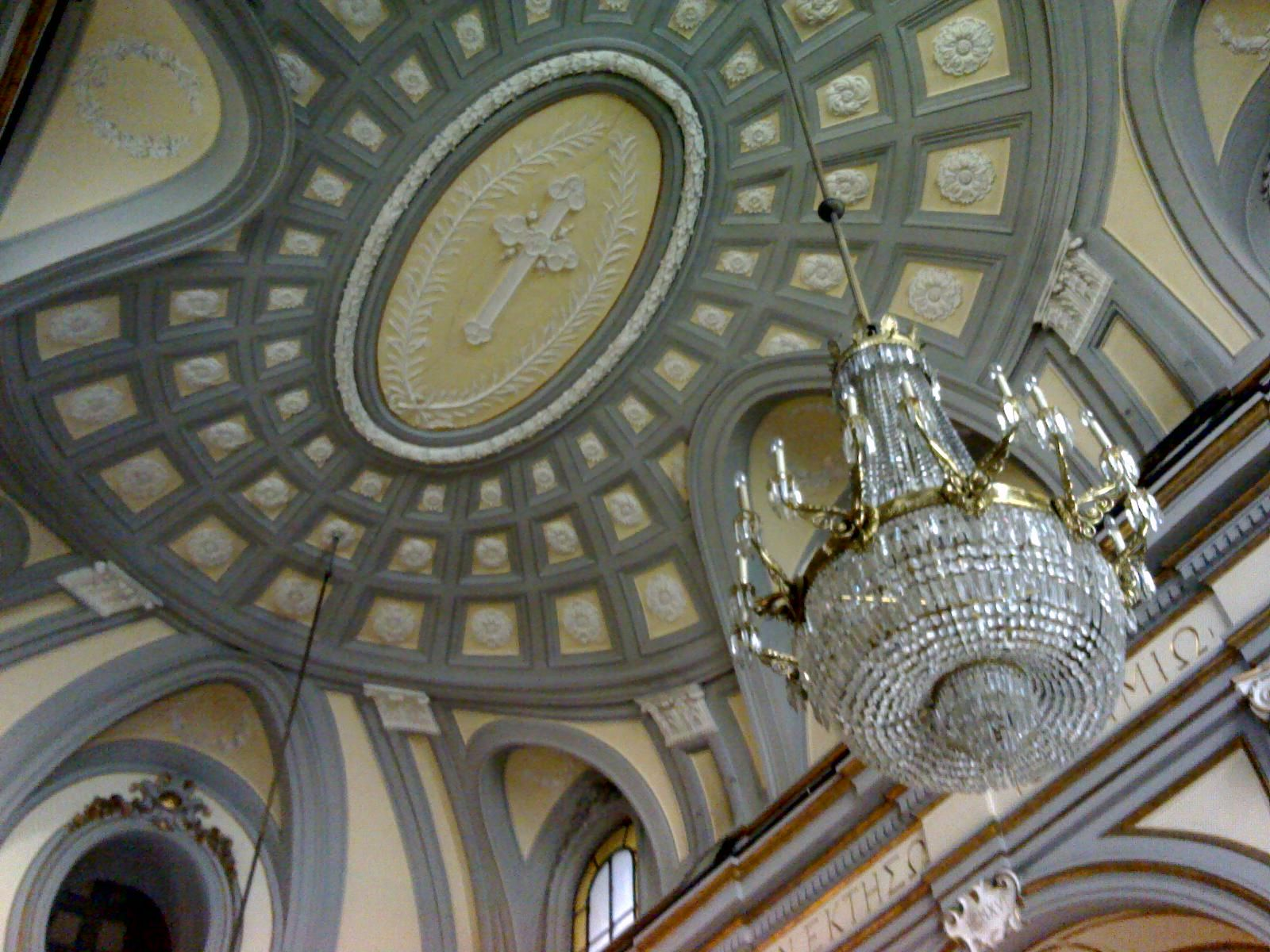 Chiesa dei Santi Pietro e Paolo dei Greci di Napoli - Il soffitto